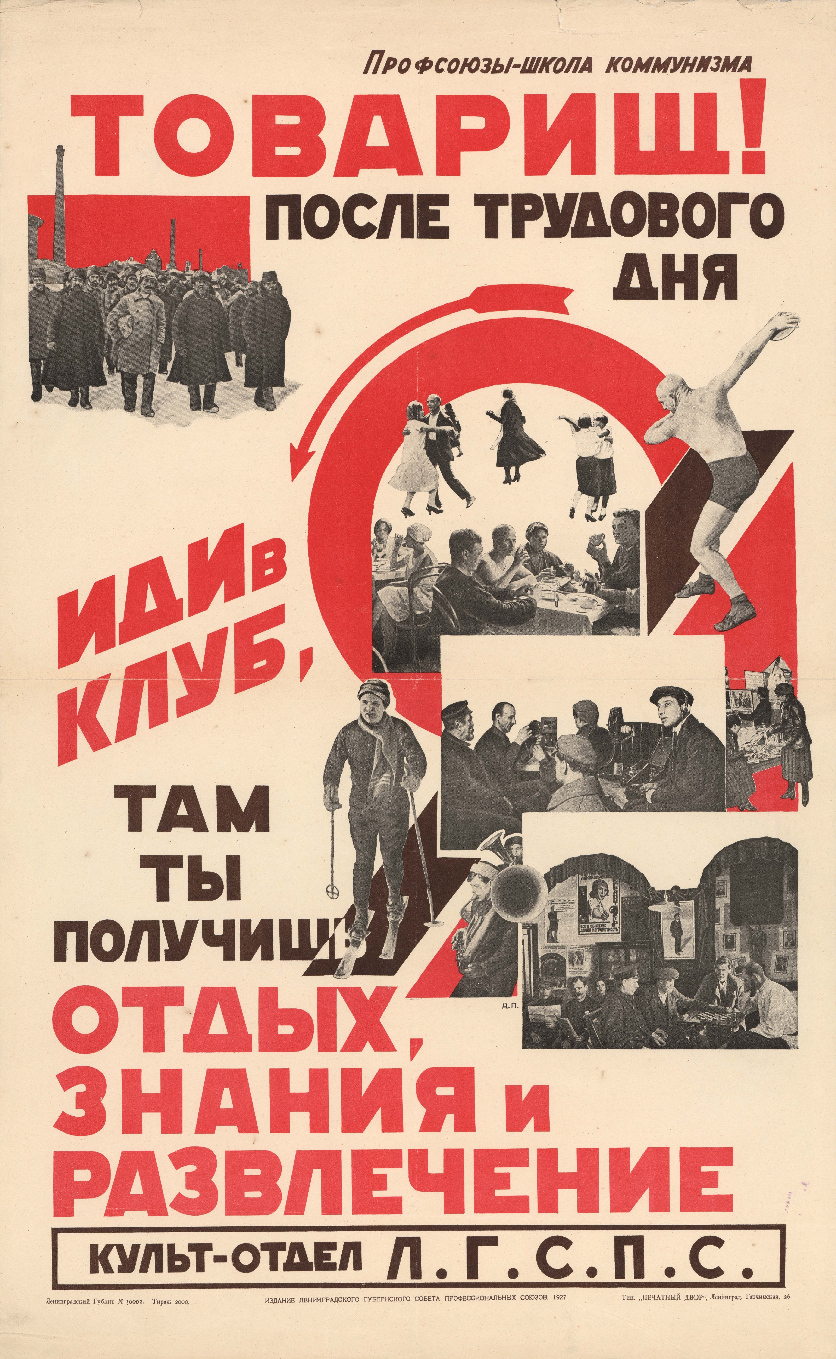 Товарищ! После трудового дня иди в клуб, там ты получишь отдых, знания и развлечение : [плакат] / худож. неизв. ; Культотдел ЛГСПС. — [Ленинград] : Ленинградский губернский совет профессиональных союзов, [1927] (Ленинград : Типография «Печатный двор»). — Автотипия, 1 лист, 92 × 49 см. — 2000 экз.